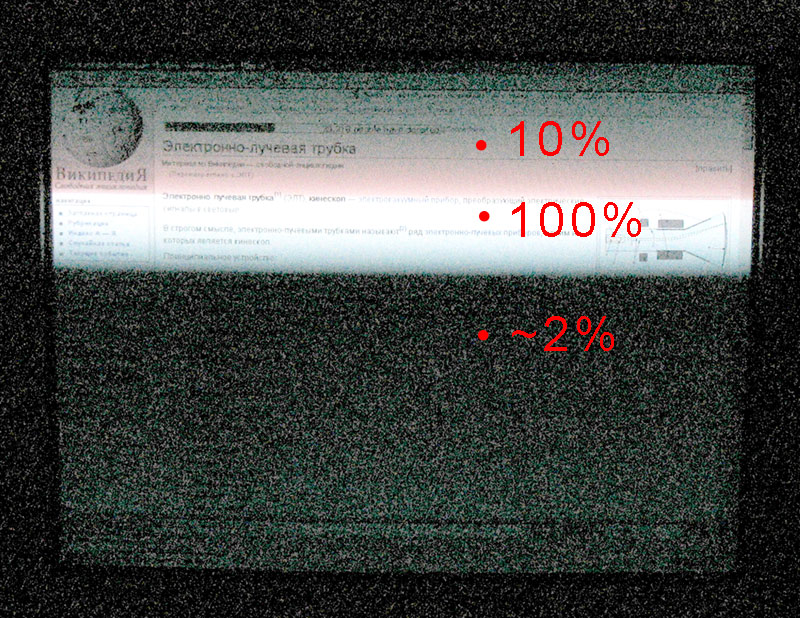 Монитор Mitsubishi DiamondPro 750SB, снятый с выдержкой 1/1000 с. Яркость искусственно завышена, отмечена реальная яркость изображения в разных точках экрана.